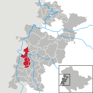 Verwaltungsgemeinschaft Vacha in Thuringia - Wartburgkreis